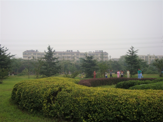 中文（中国大陆）: 河北省唐山市